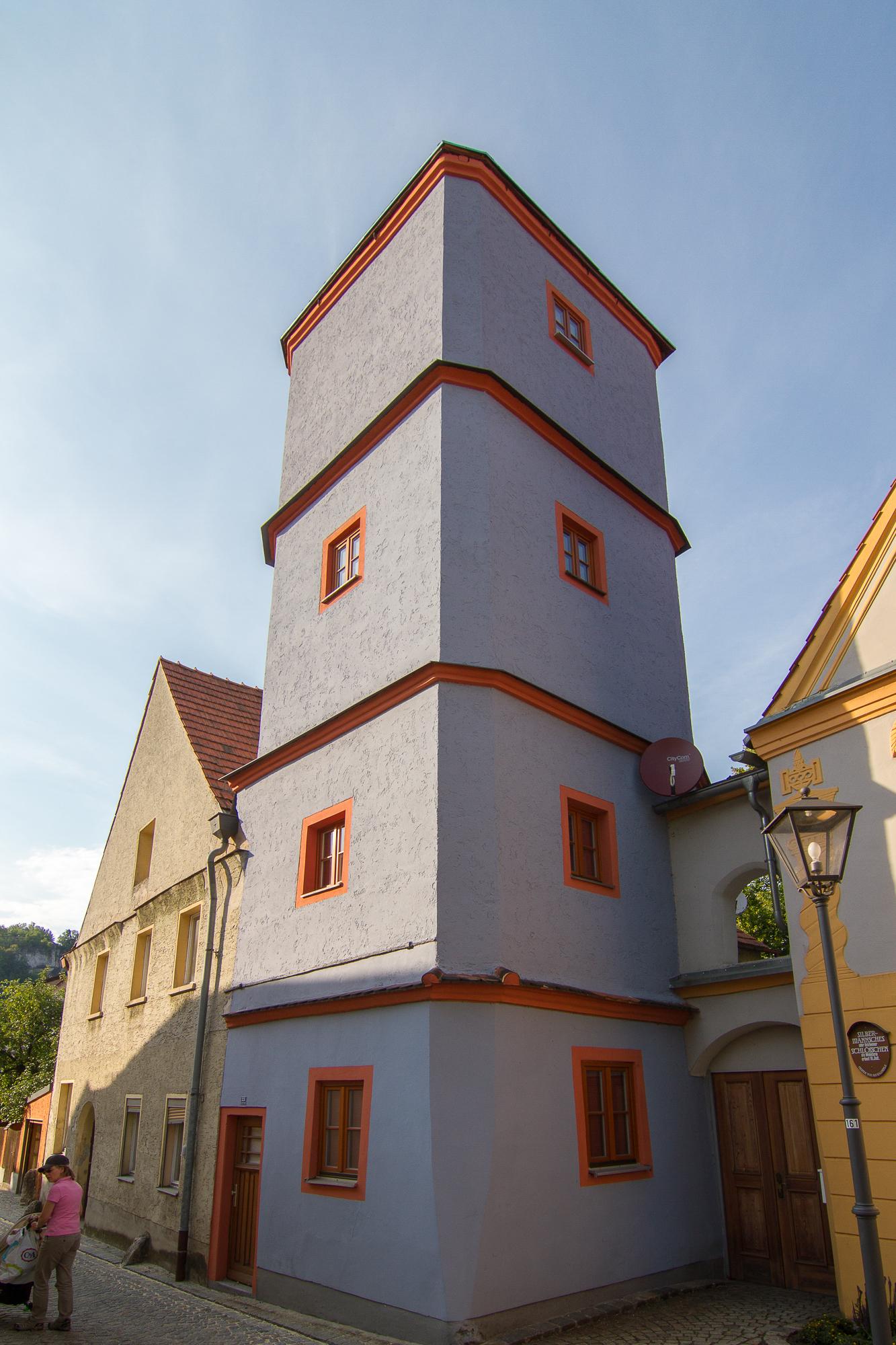 Silbermannsches Schlösschen; viergeschossiger Wohnturm mit Gesimsteilung, bez. 1582This is a photograph of an architectural monument.